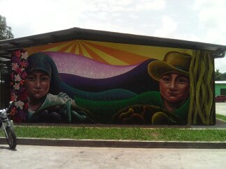 Fotos hermosas